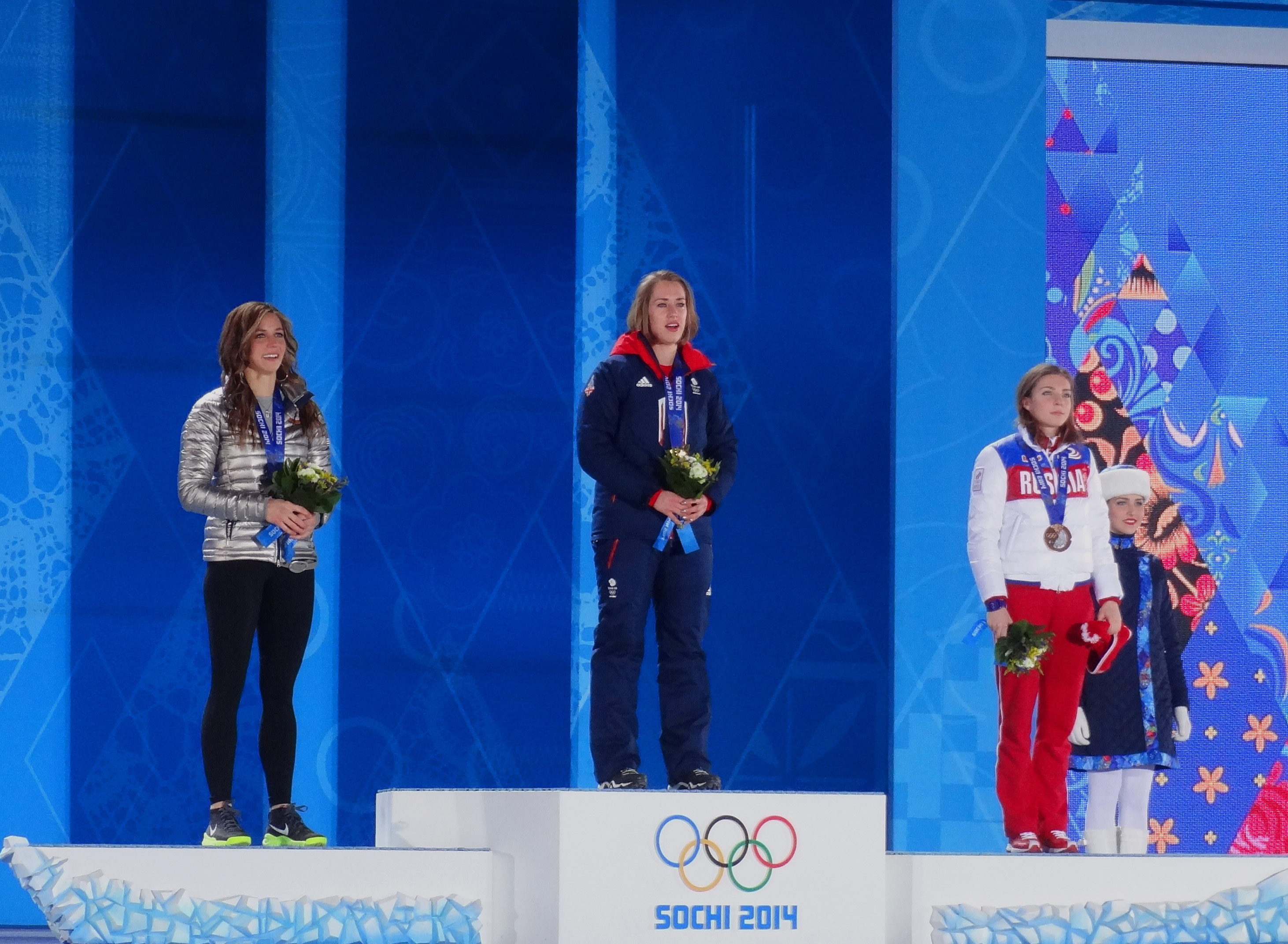 На фото: Елена Никитина, Элизабет Ярнольд, Ноэль Пайкус-Пейс. Церемония награждения на Зимних Олимпийских играх 2014 года в Сочи.